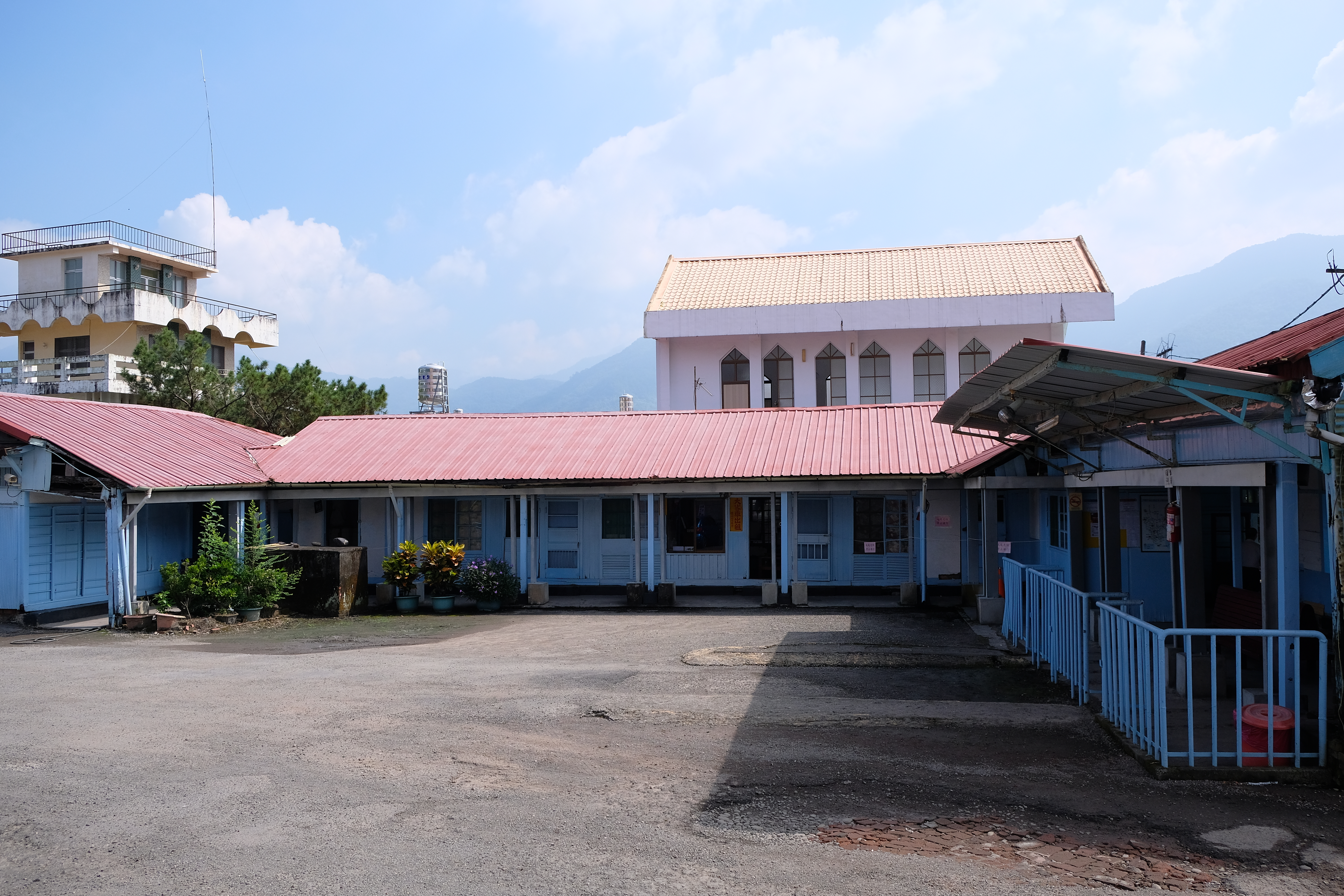 2018 Ikeda House Liouguei District 原六龜里池田屋